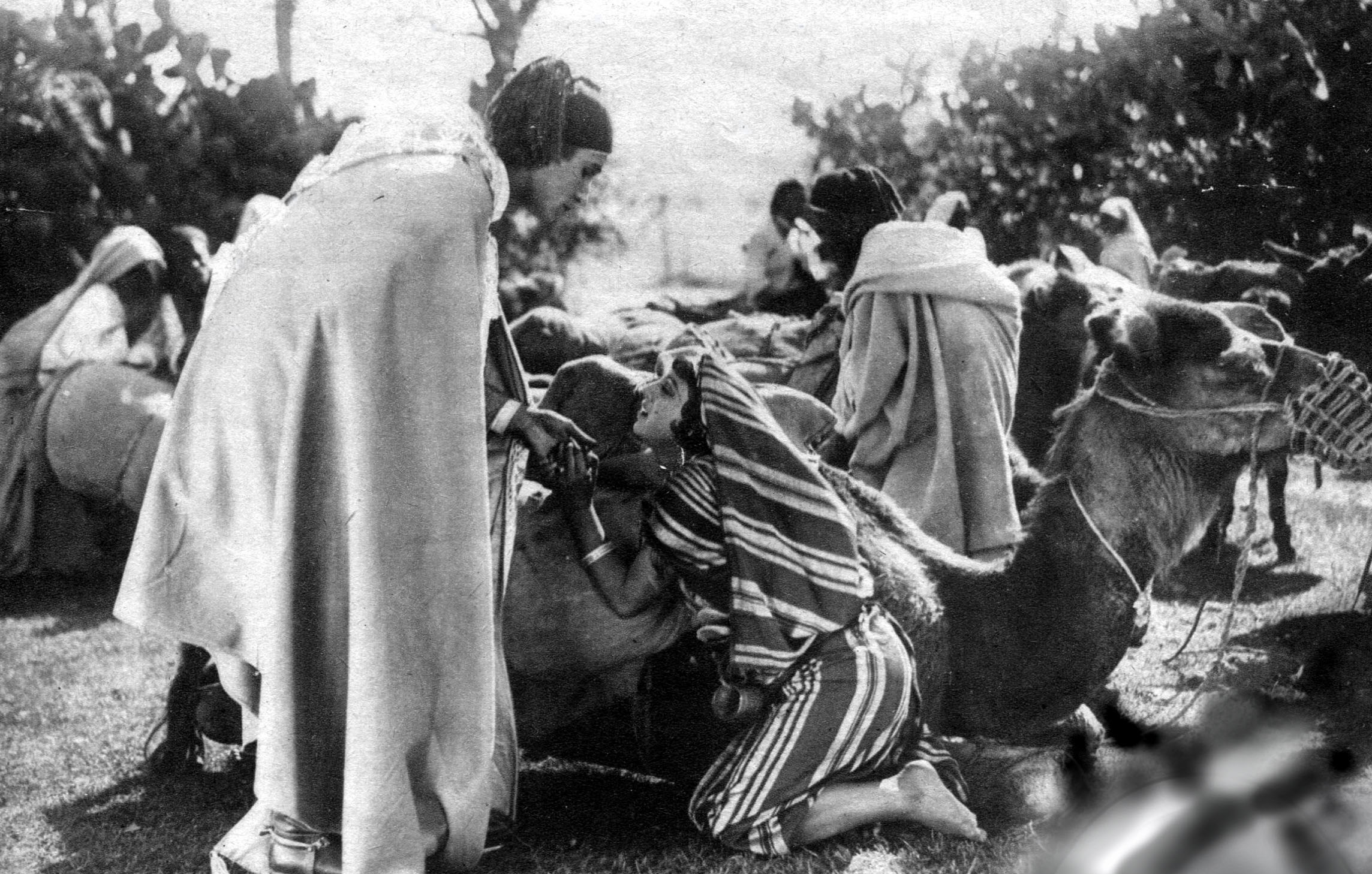 Kif Tebbi, regia di Mario Camerini - prod A.D.I.A. Roma 1928 - Foto di scena